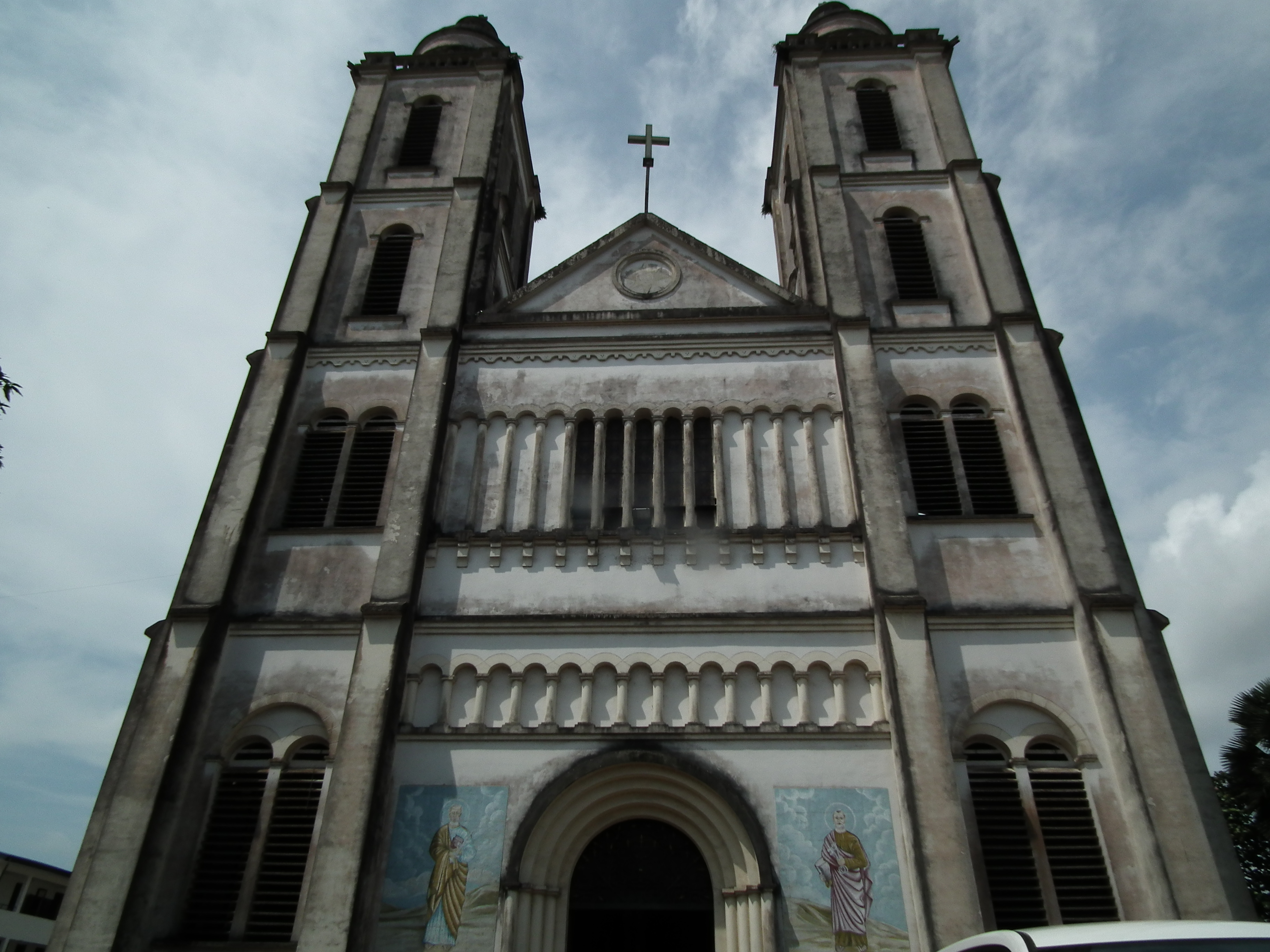 Cathédrale Saint-Pierre-et-Saint-Paul de Douala